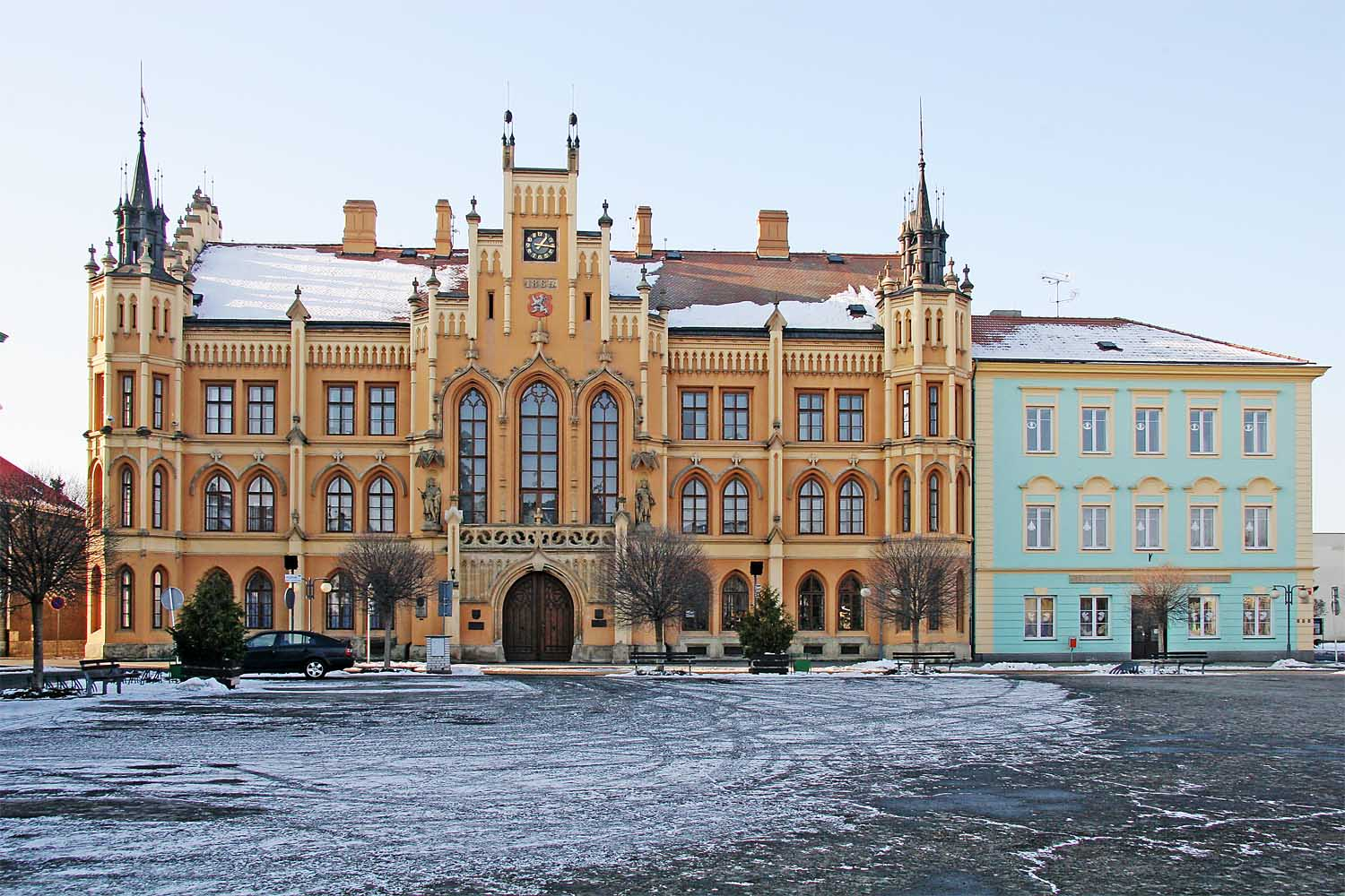 Radnice v Novém Bydžově